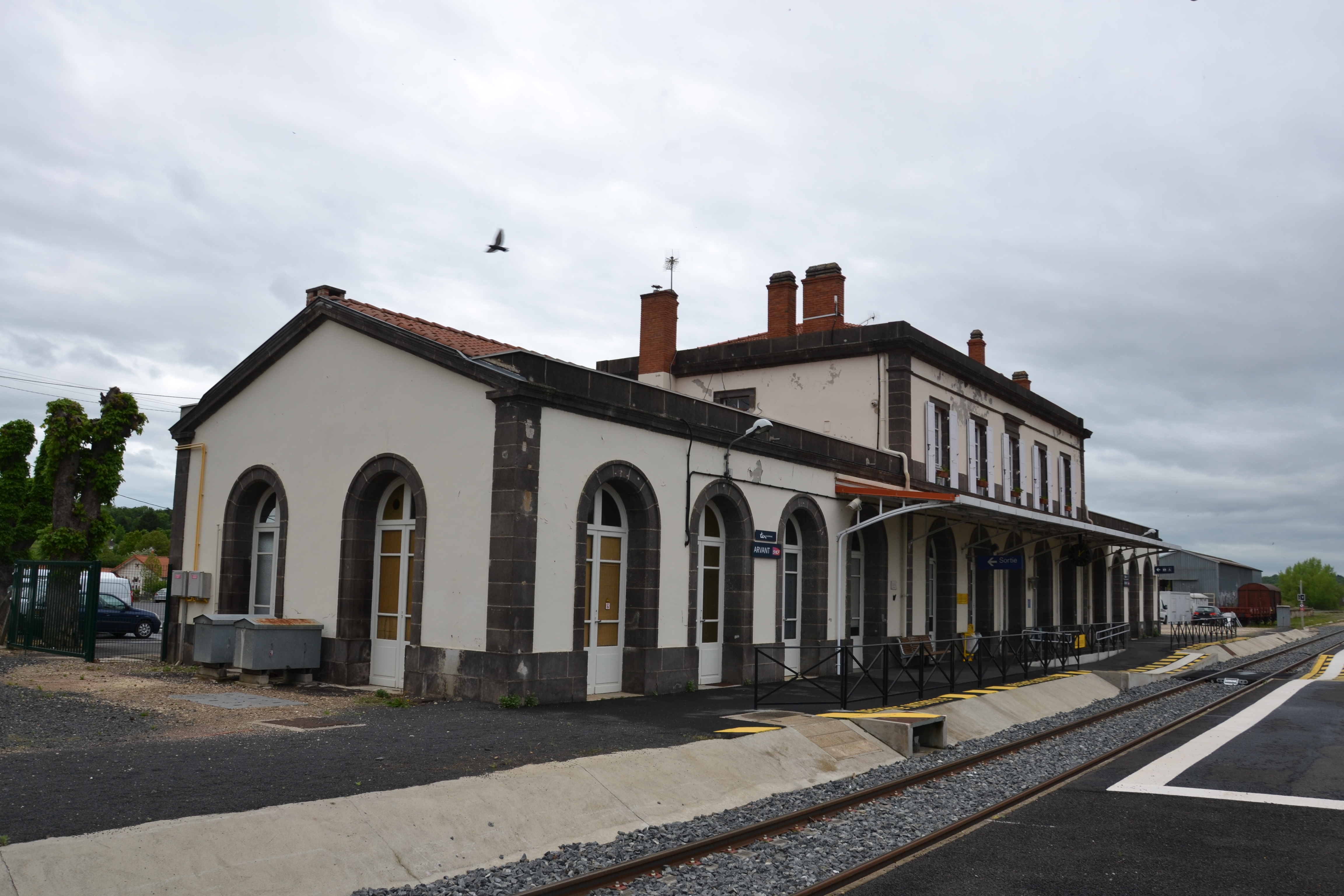 Bâtiment voyageurs côté voies